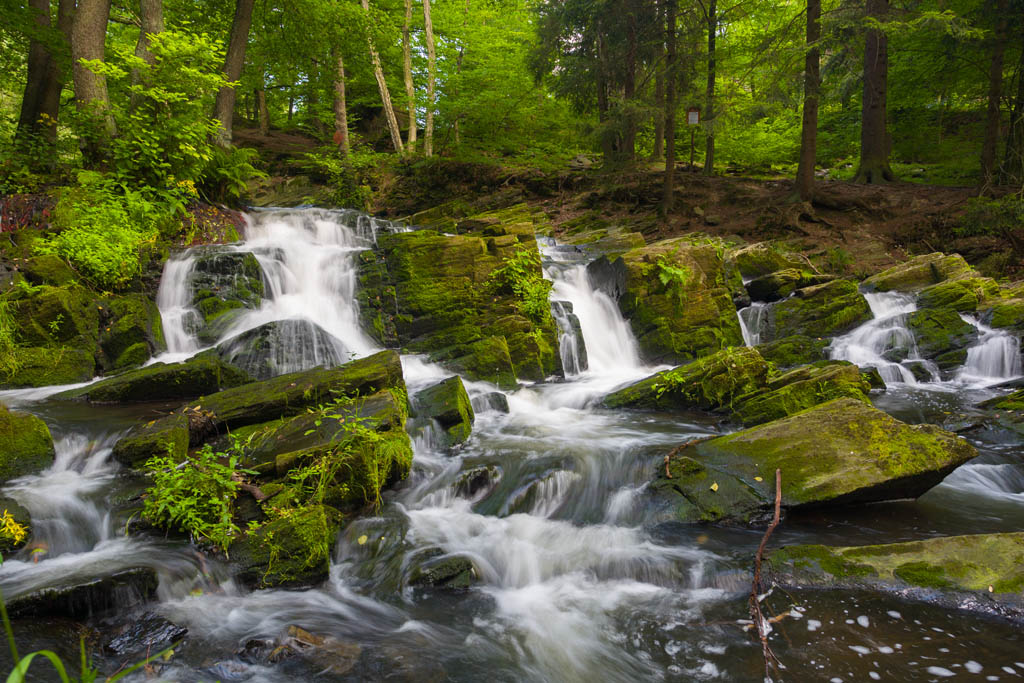 Selkewasserfall Nähe Alexisbad/Harz